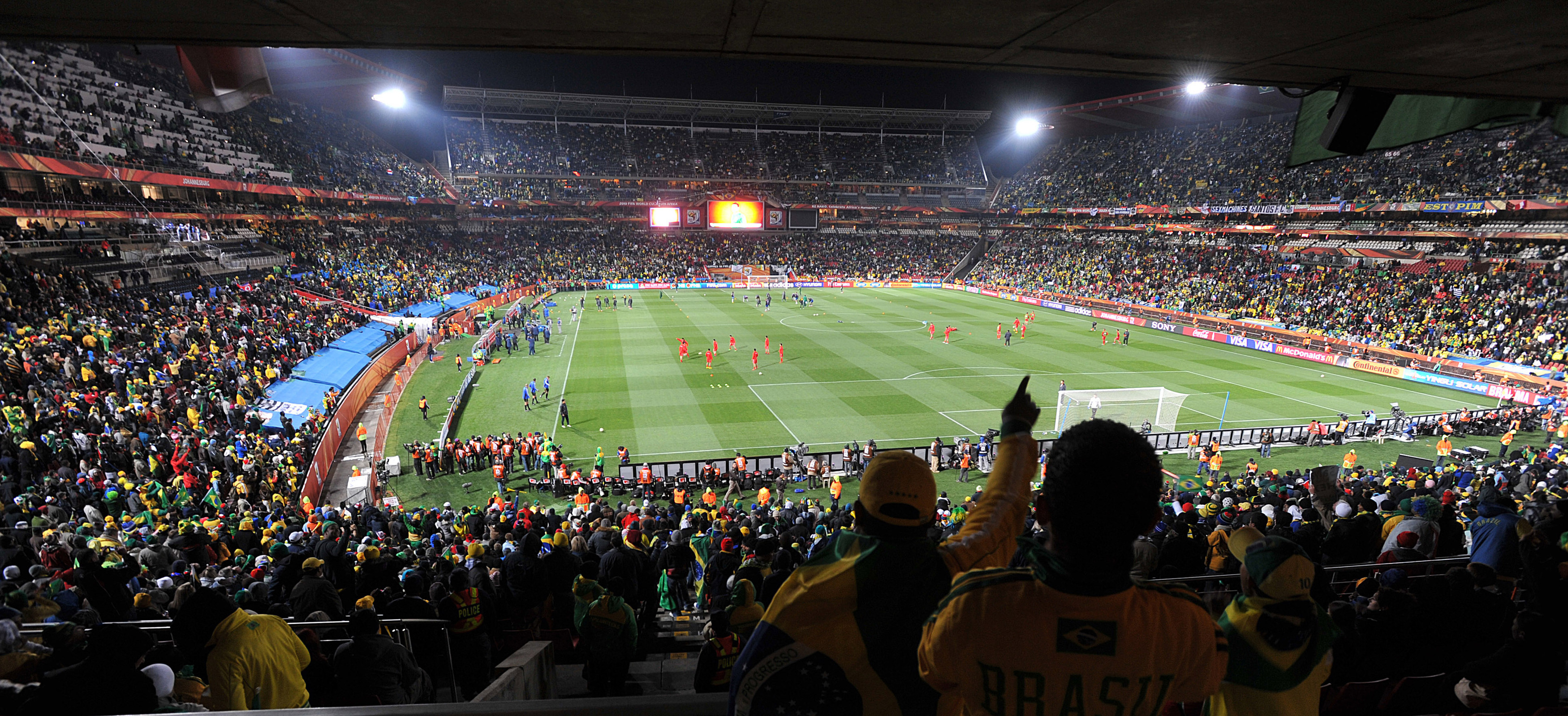 Joanesburgo (África do Sul) - Observadores brasileiros na copa do mundo criticam segurança e transporte na África do Sul, os estádios são destaques positivos.